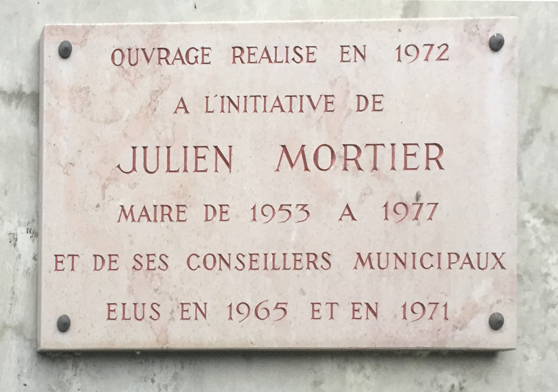 Plaque pont Saint-Martin-du-Mont.